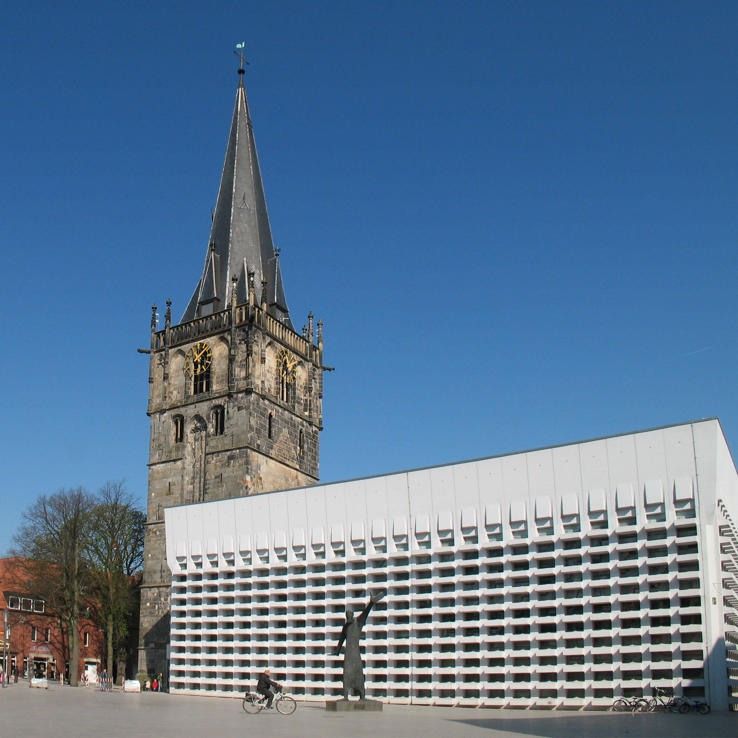 Kath. Kirche St. Mariä Himmelfahrt Ahaus in der Innenstadt